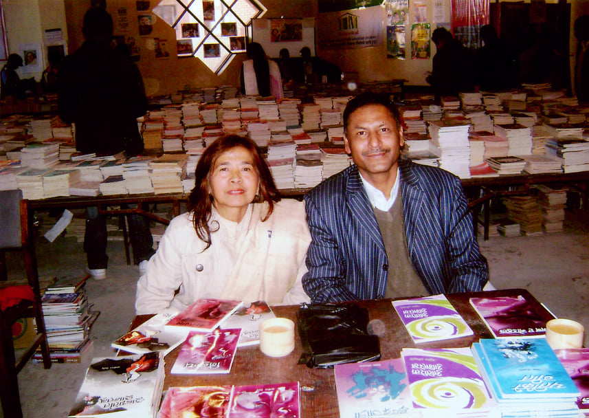 नेपाली: मिति ९ मङ्सिर, २०६४ मा राष्ट्रिय नाचघर जमल काठमाडौंमा साझा प्रकाशनले आयोजना गरेको वृहत् पुस्तक प्रदर्शनीमा कवि दिनेश अधिकारीका साथमा वानिरा गिरी